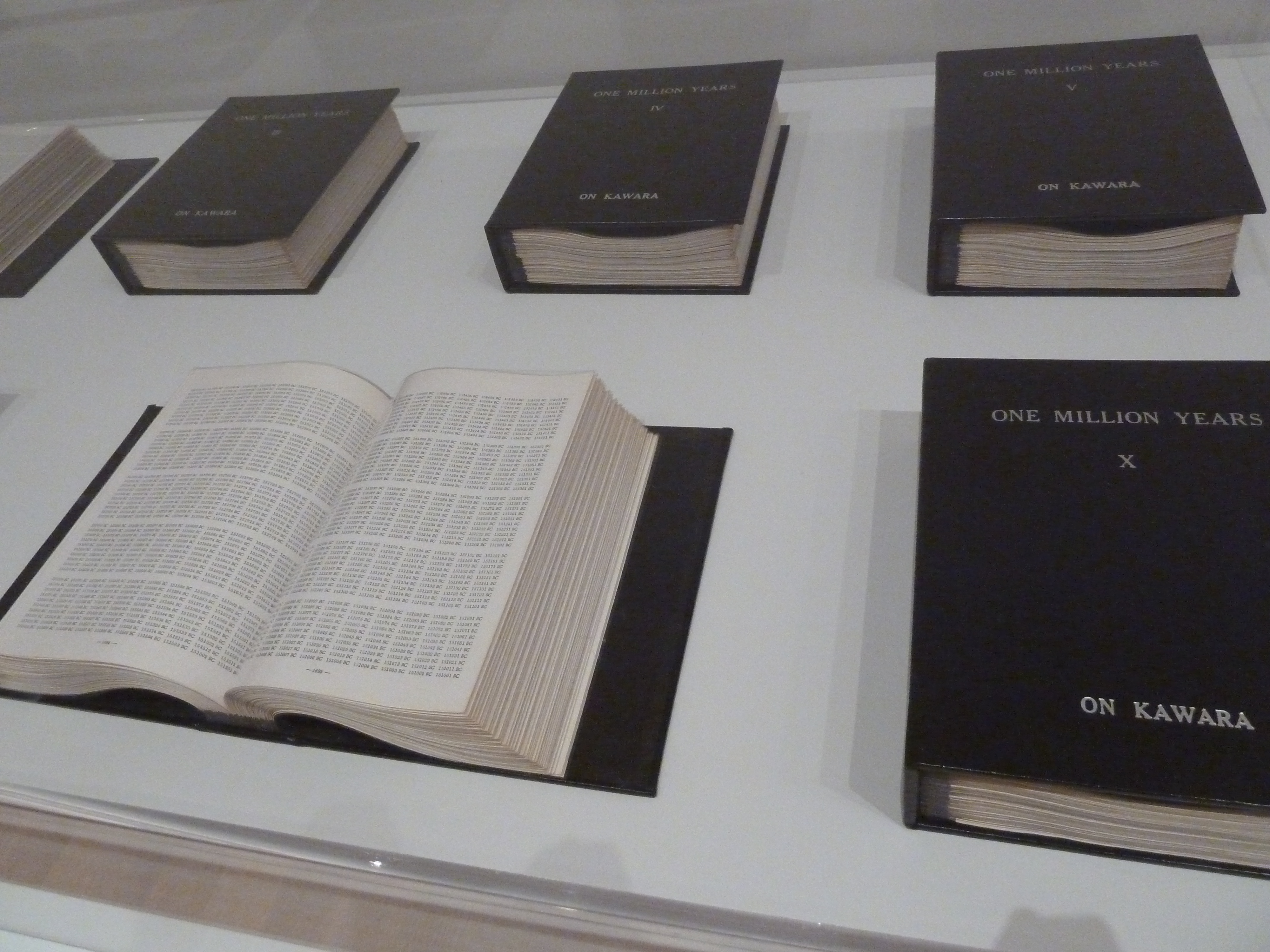 ผลงาน One million years โดย อง คาวาระ